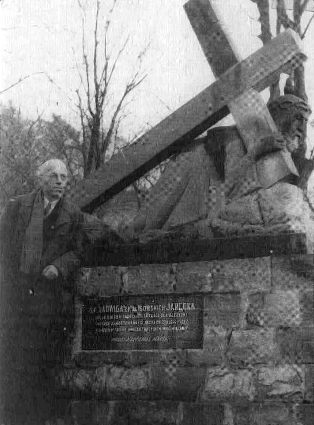 pomnik Jareckiej w Niewodnej